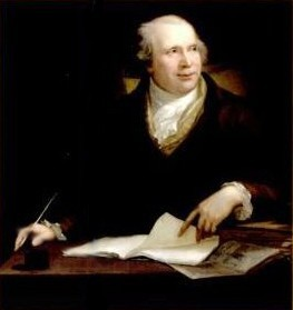 Portrait des jüdischen Arztes und Philosophen Marcus Herz.